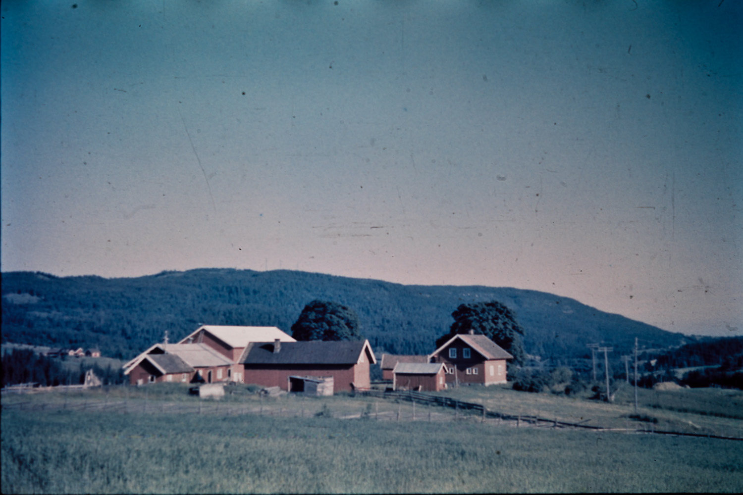 Bildet er hentet fra Arkivverket. Åmot gård i Sørkedalen. Radiomastene på Tryvann kan så vidt skimtes på åsen bak. Fotograf: Thomas Neumann År: 1937 Kamera: Leica Film: Agfa color neu Arkivinstitusjon : Riksarkivet Arkivnavn : Neumann, Thomas Sted : Norge, Oslo, Oslo, Emneord: Landskap Avbildet